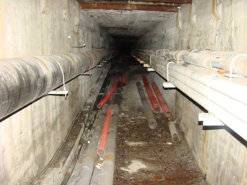 Détail de l'intérieur d'un caisson avec les différentes canalisations.